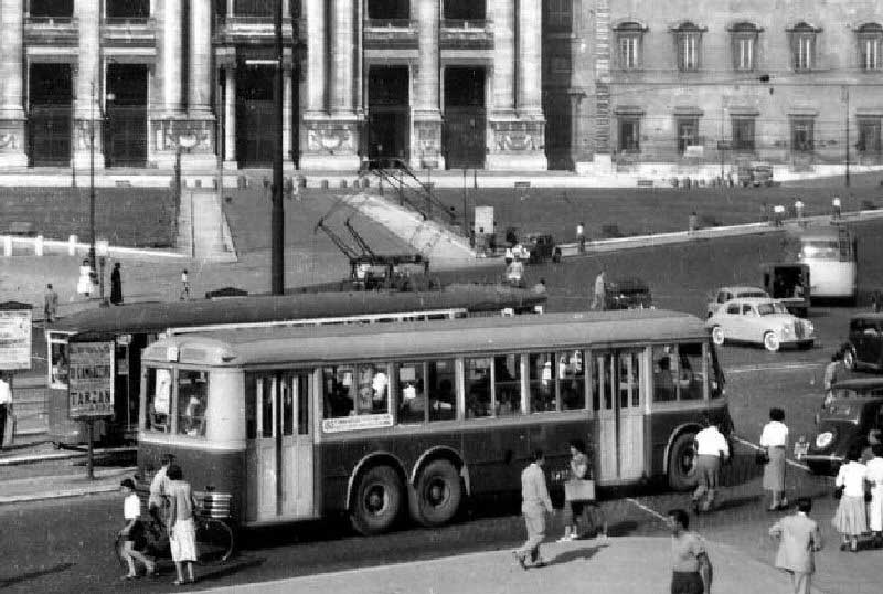 Autobus Alfa Romeo 140-A di Roma sulla linea 85 a San Giovanni